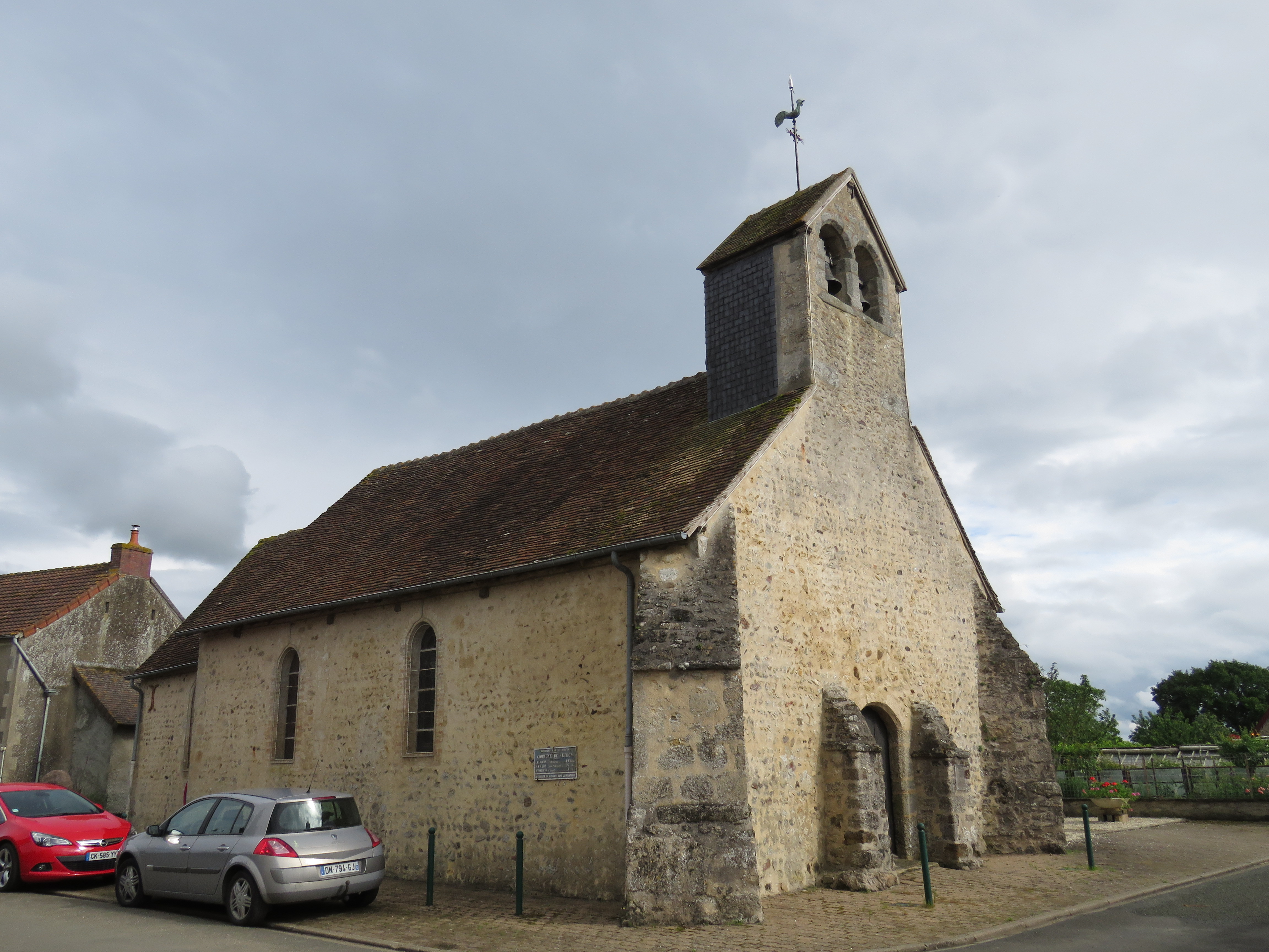 église